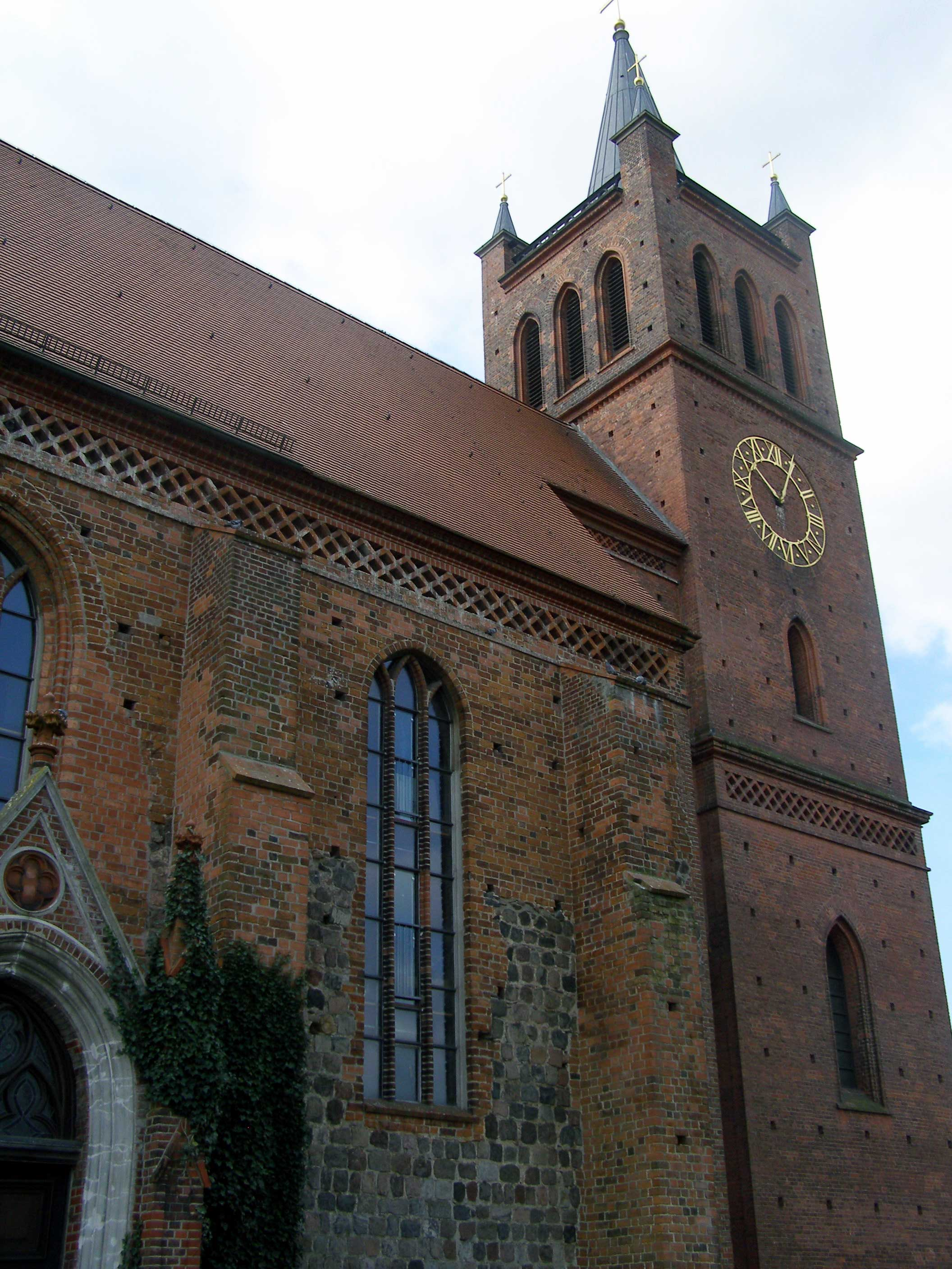 St. Marienkirche in Müncheberg bei Berlin